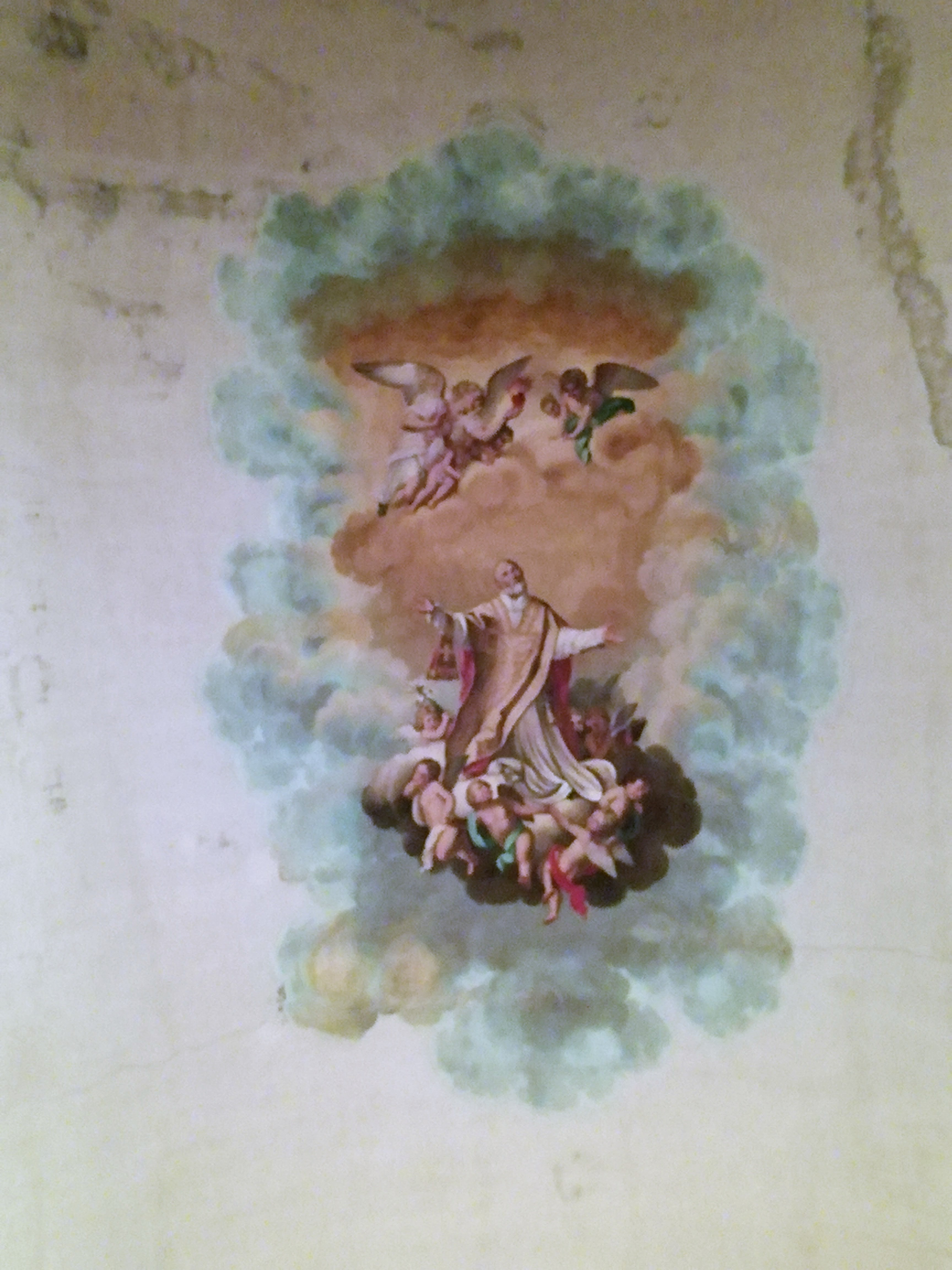 Affresco volta: San Filippo Neri, opera di Giuseppe Rapisardi.